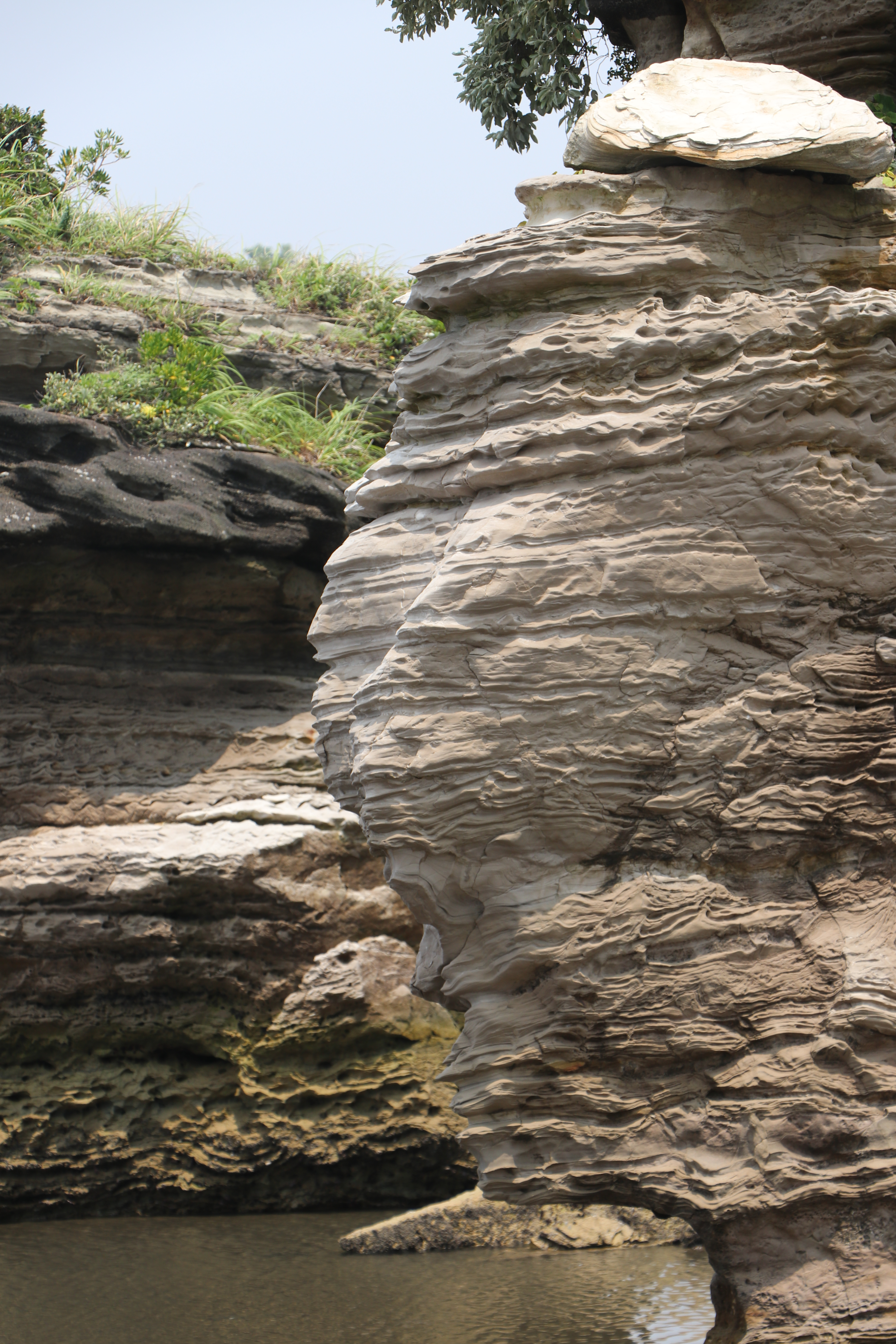 神奈川県三浦市二町谷で観察可能な漣痕。通称「トンビ山(トビ山)」のもの。